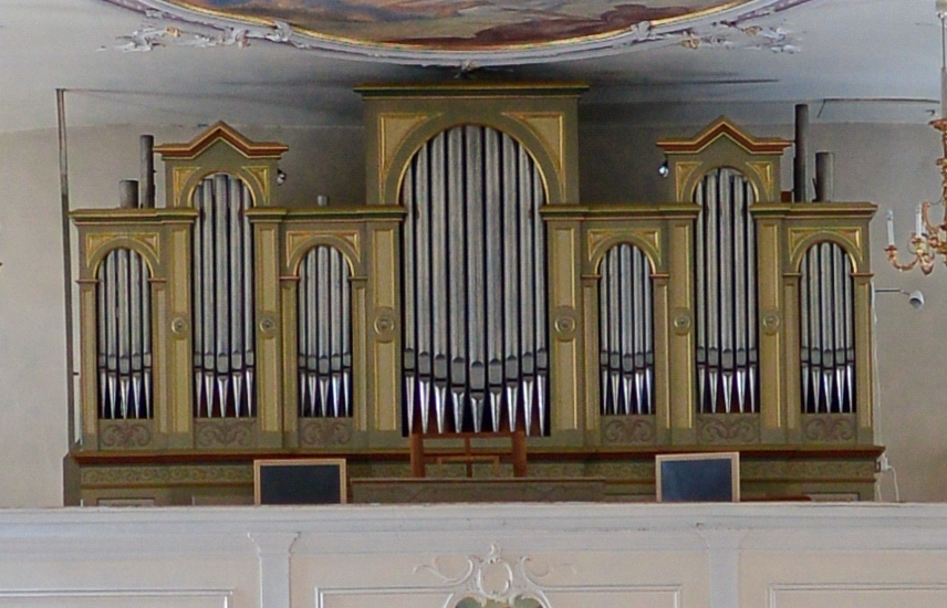 Pfarrkirche Hl. Leonhard in Au (Vorarlberg)